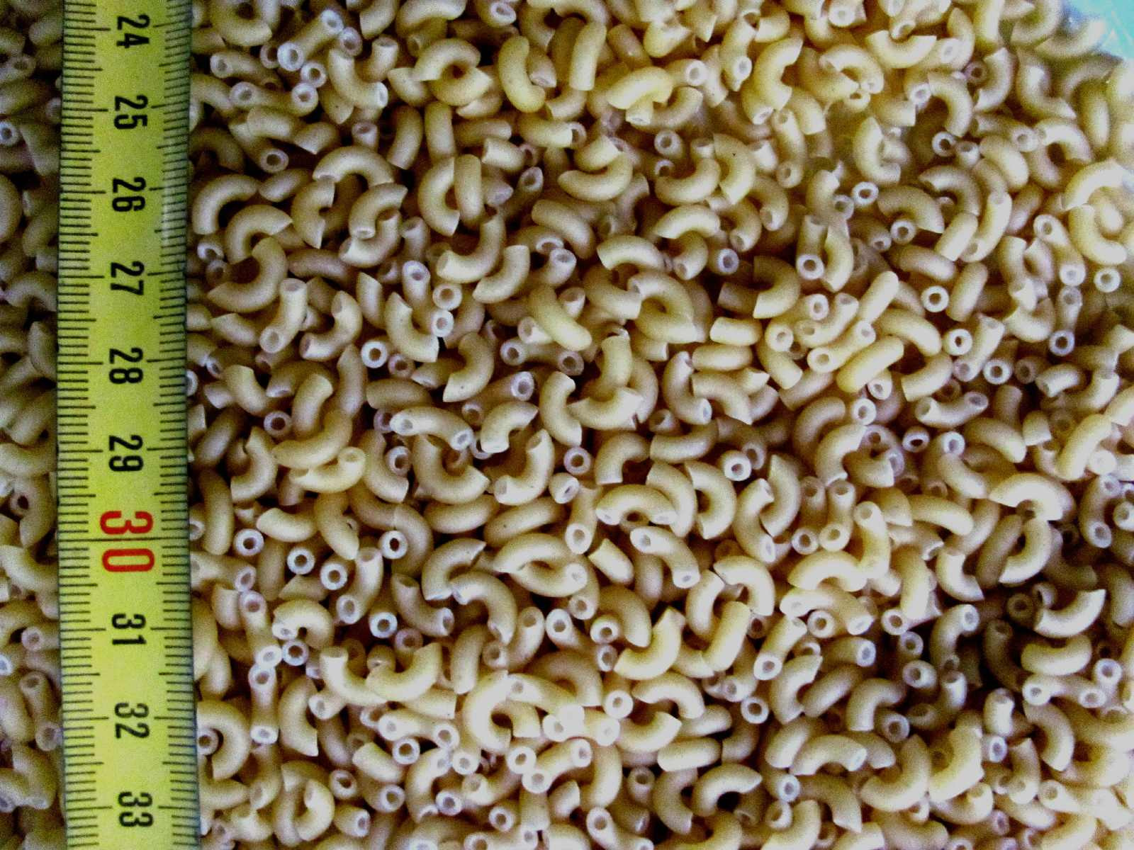 (french) pasta "coquillettes"